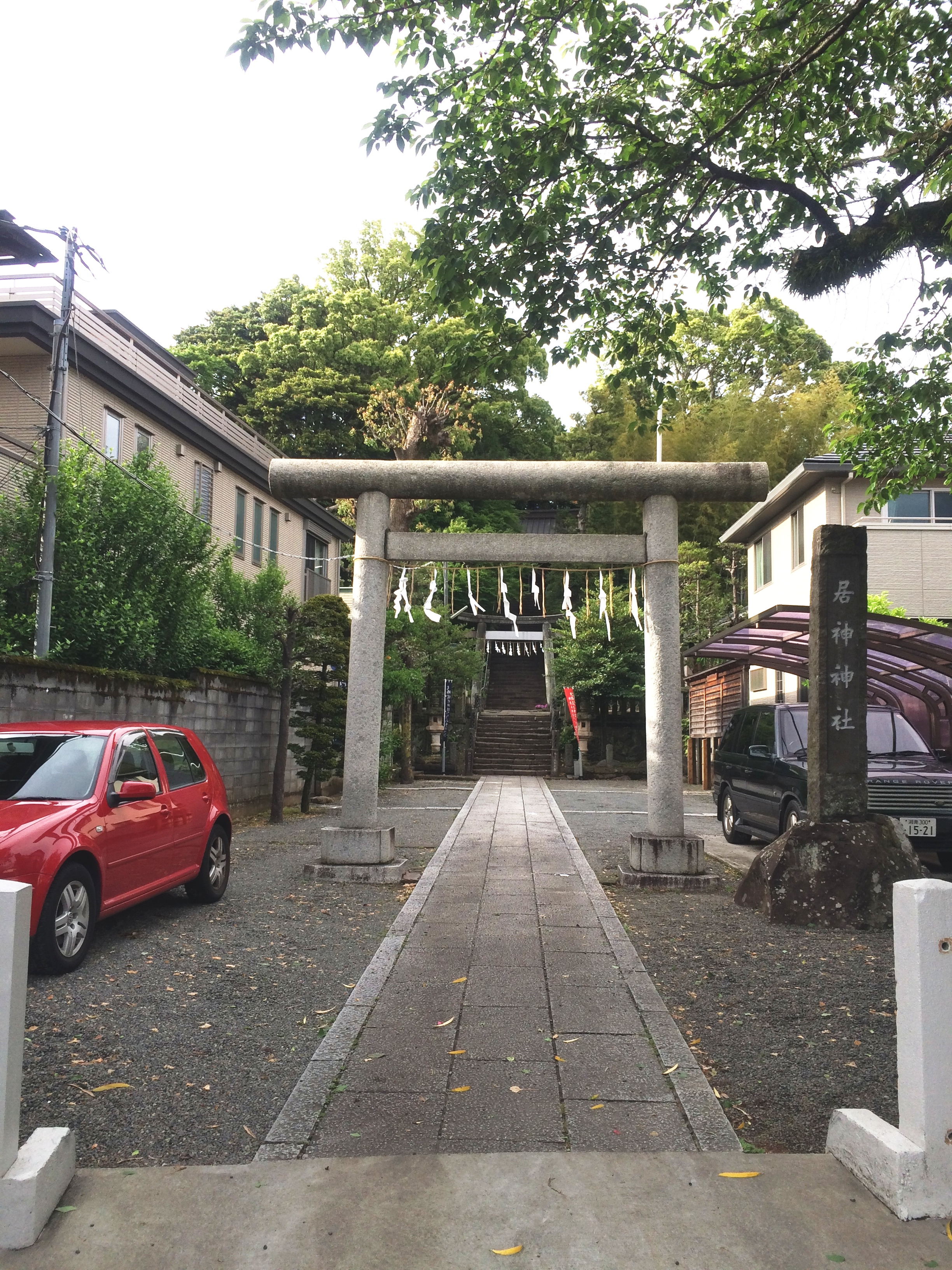 居神神社の入口。外見からは分からないが、奥に階段が続く。